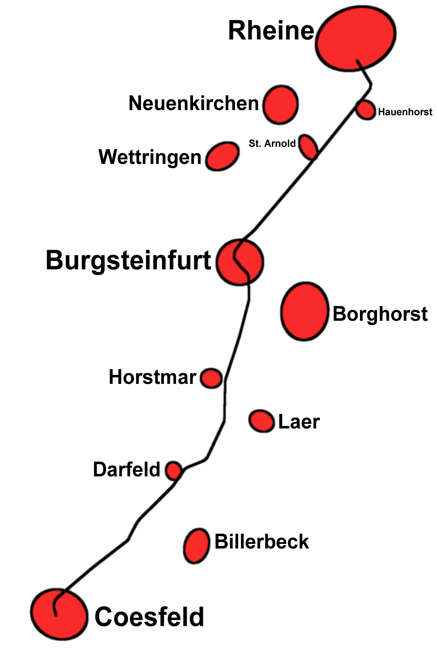 Skizze des Verlaufes der ehemaligen Bahnstrecke Rheine-Coesfeld, die zum Radweg „Schlossallee“ ausgebaut wird.